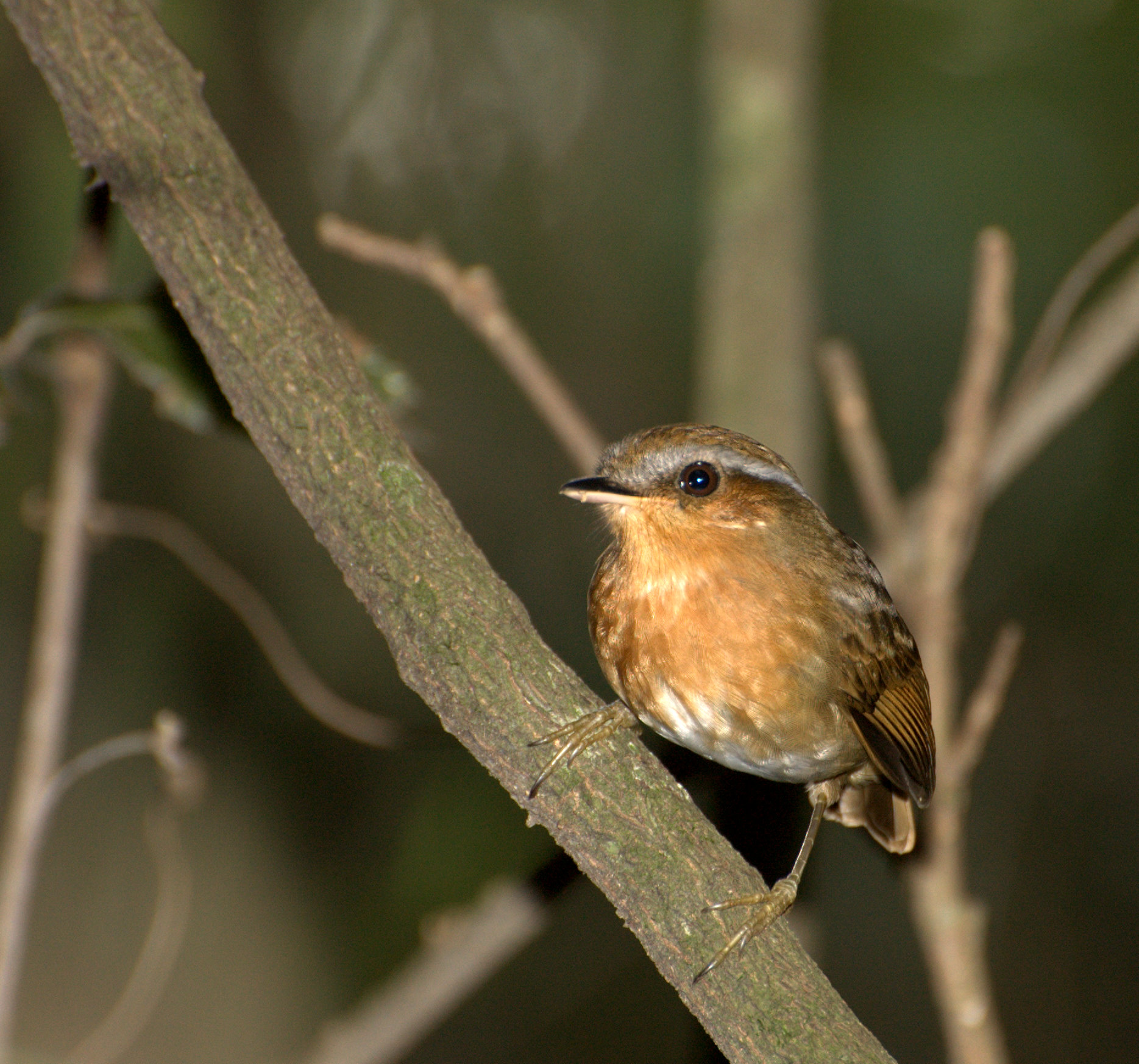 Parque Estadual da Serra da Cantareira - São Paulo-SP - Brasil